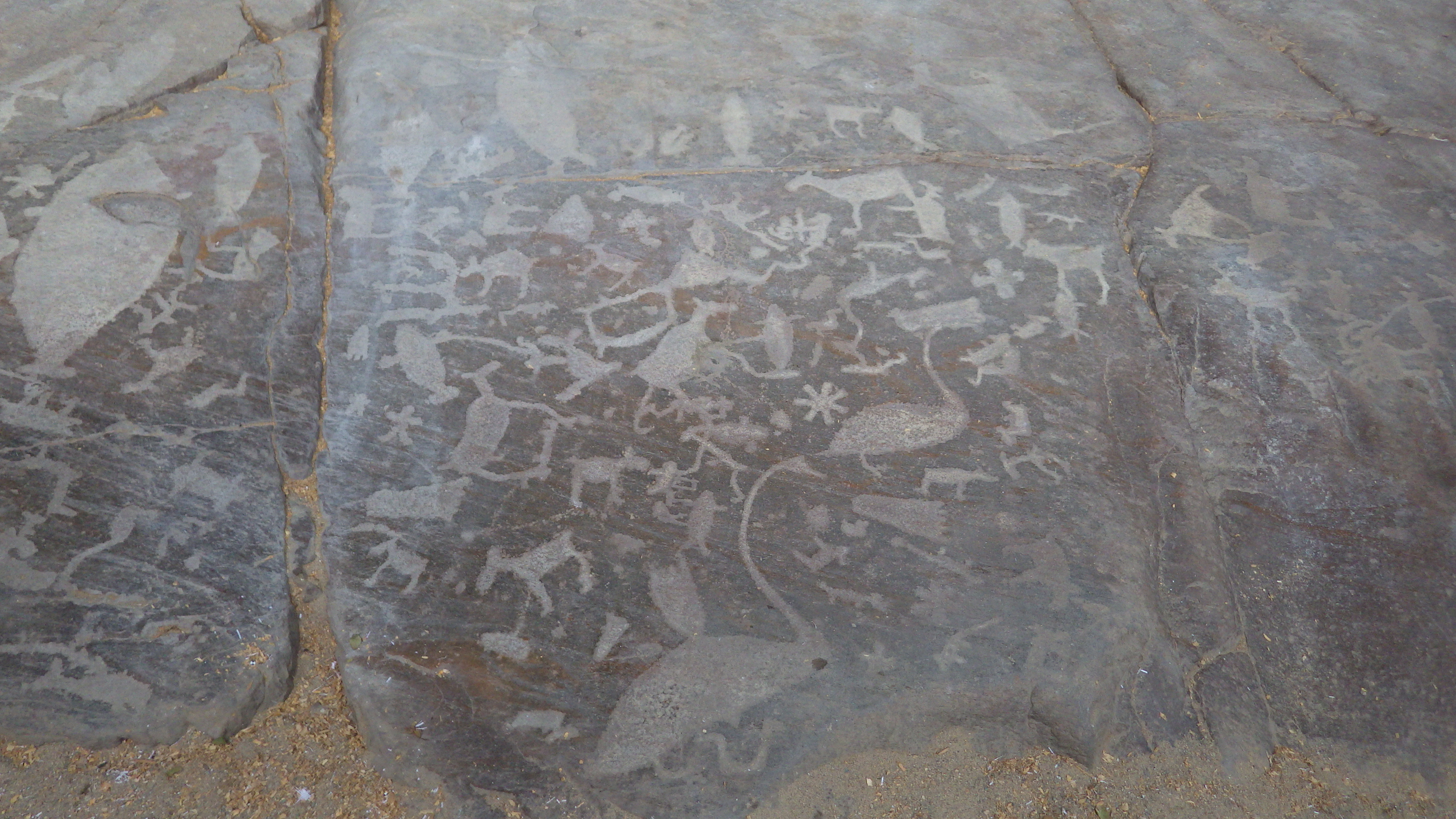 Бесовы следки петроглифы